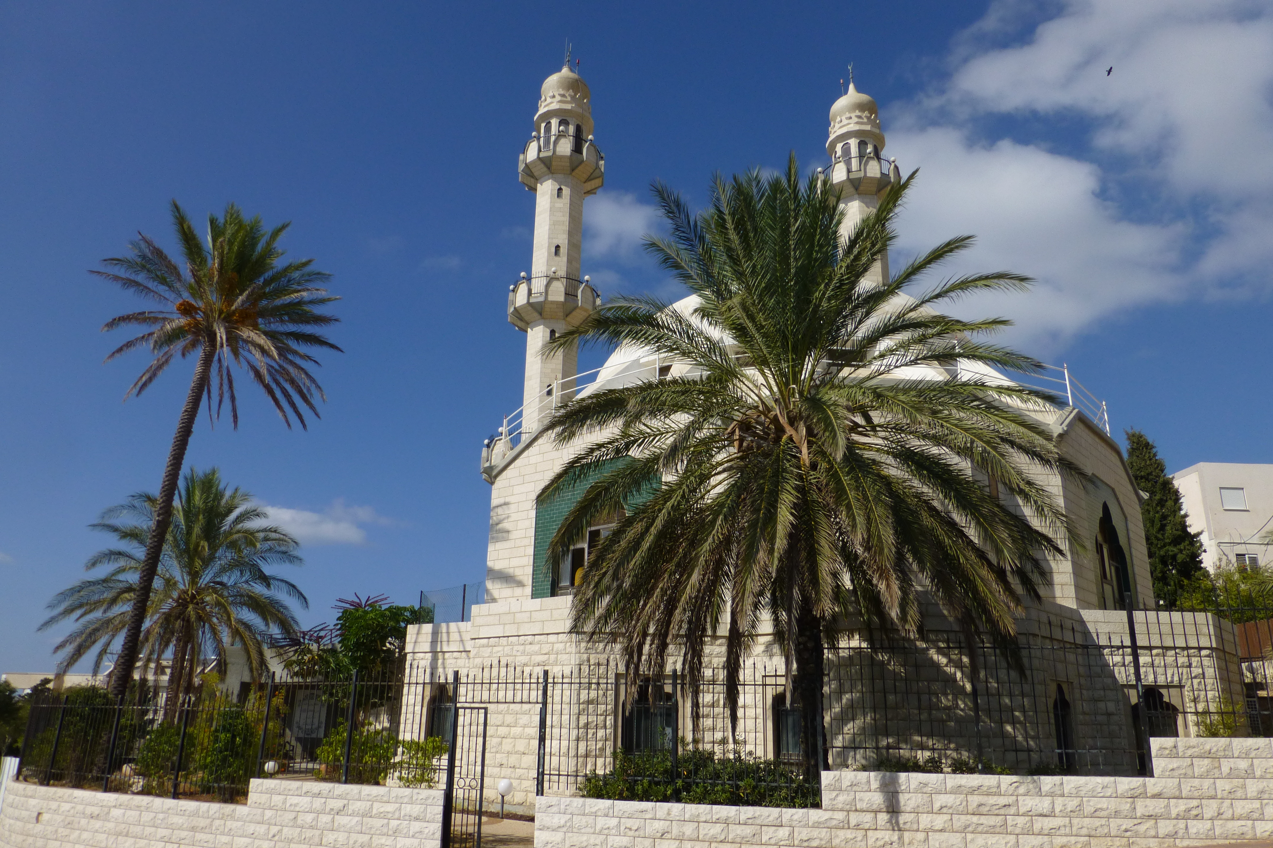 מסגד סיידנא מחמוד בשכונת כבביר בחיפה. מסגד זה משתייך לפלג האחמדים שנוסד בהודו ומטיף לנאורות, שלום ואהבה לאחר.